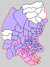 長野県埴科郡の町村。